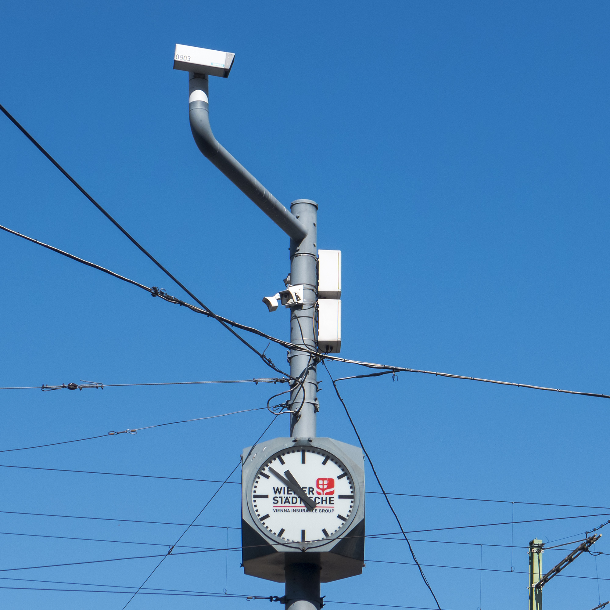 Kreuzung Währinger Gürtel/Nussdorfer Straße in Wien 9